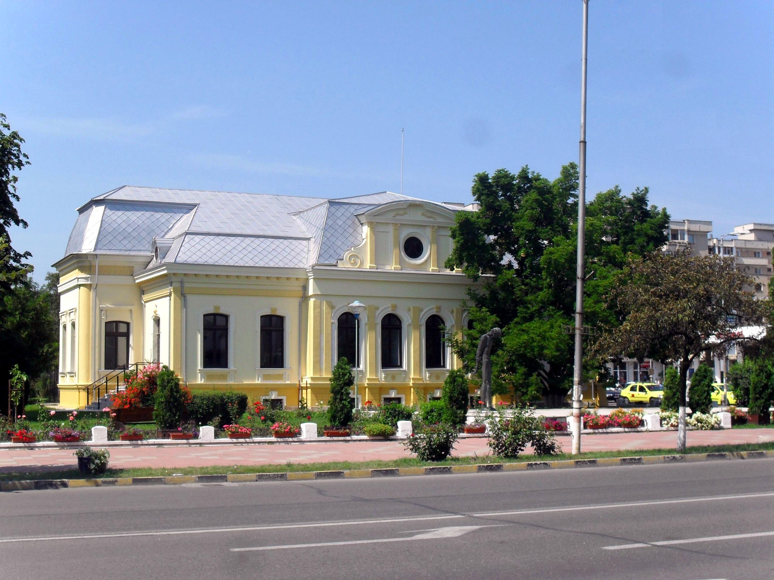 Ex sediu a primariei Bacau, si a bibliotecii judetene.